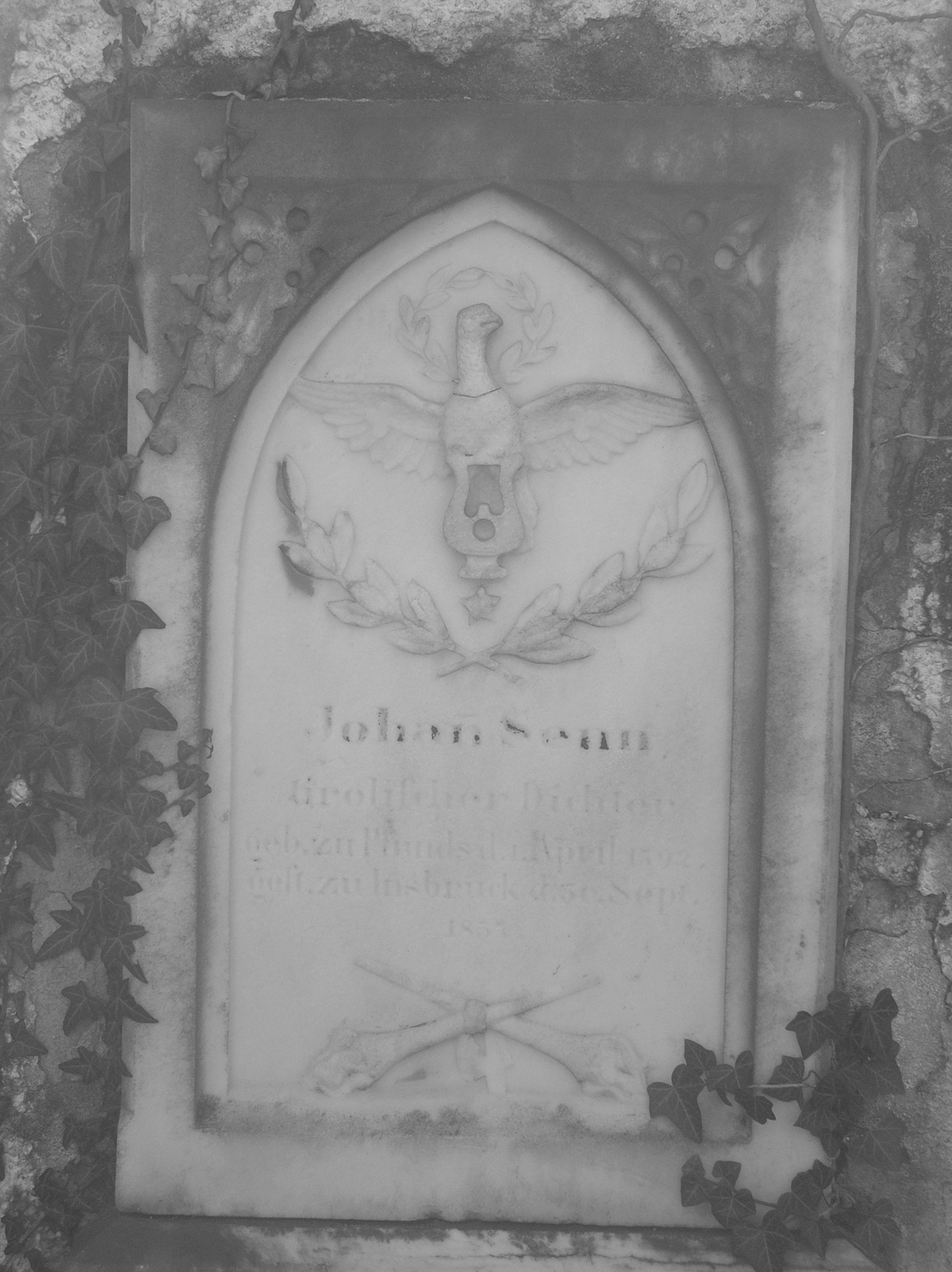 Grabstein von Johann Senn am Militärfriedhof in Pradl. Auf der Fotografie ist eine Bruchstelle am Hals des Adlers erkennbar. Diese rührt daher, dass dem Adler von Grabschändern der Kopf abgeschlagen wurde (Innsbrucker Nachrichten 14.03.1871).